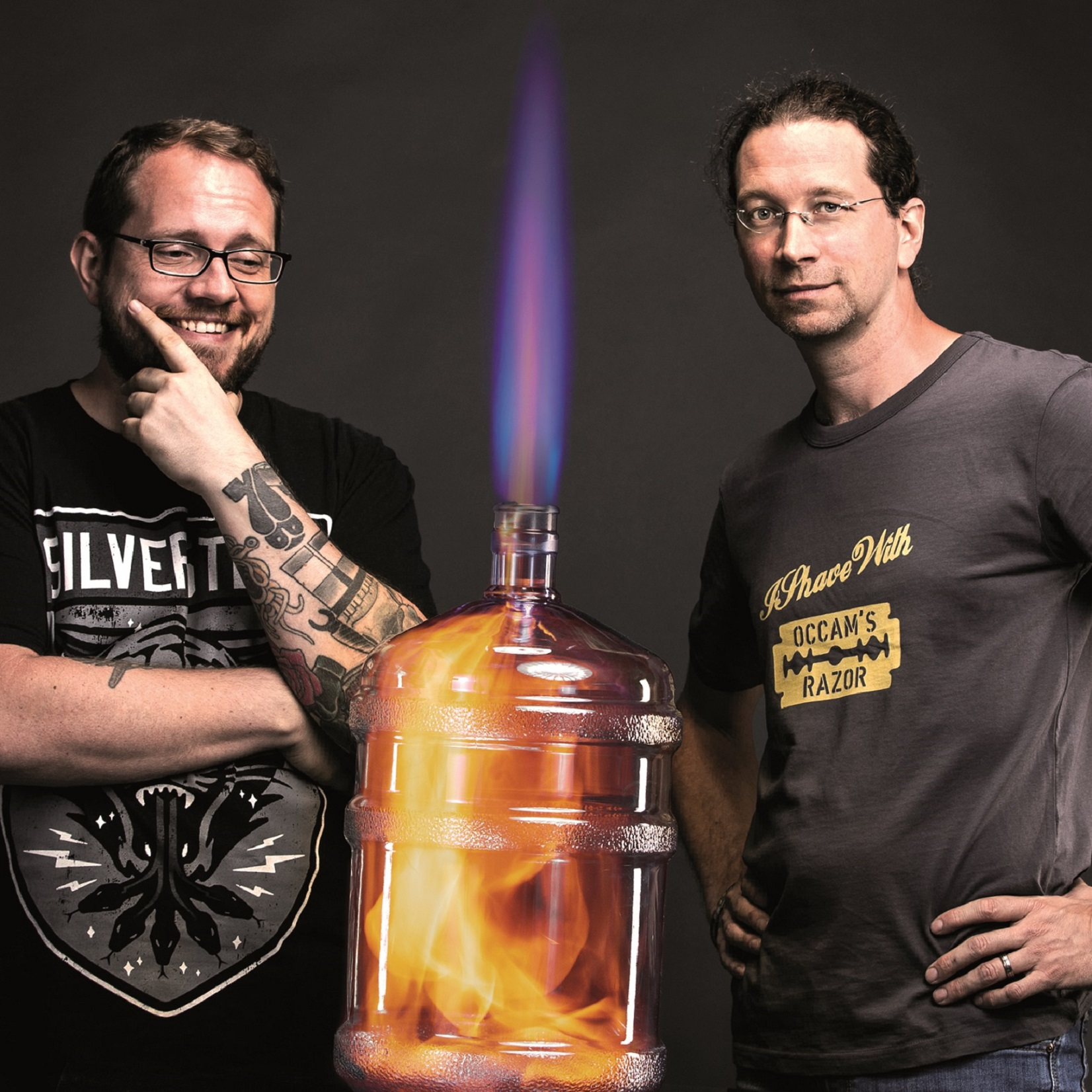 Reinhard Remfort und Nicolas Wöhrl, die Macher des Wissenschaftspodcasts „Methodisch inkorrekt!“